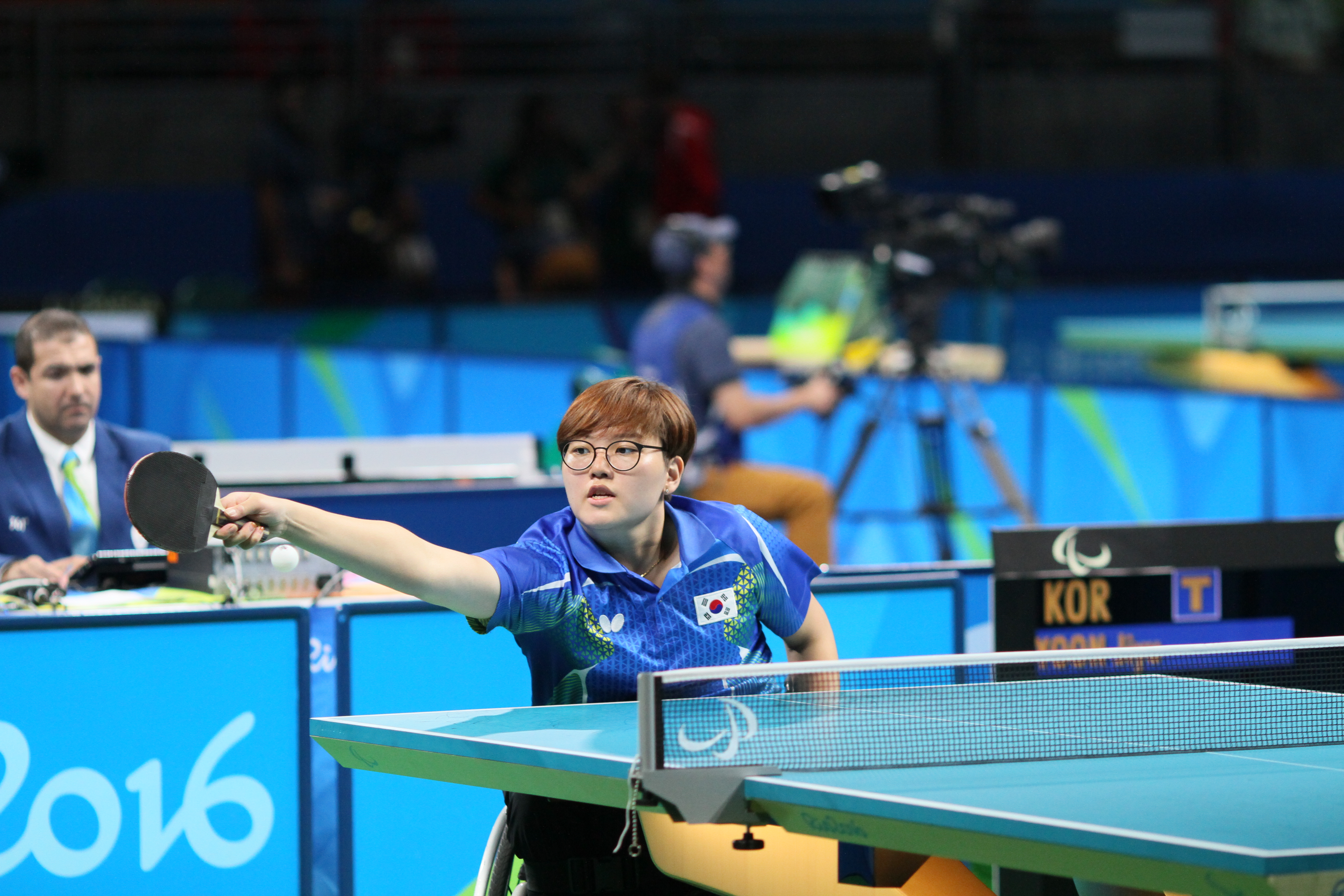 YOON Jiyu (KOR,F3) IMG_5480